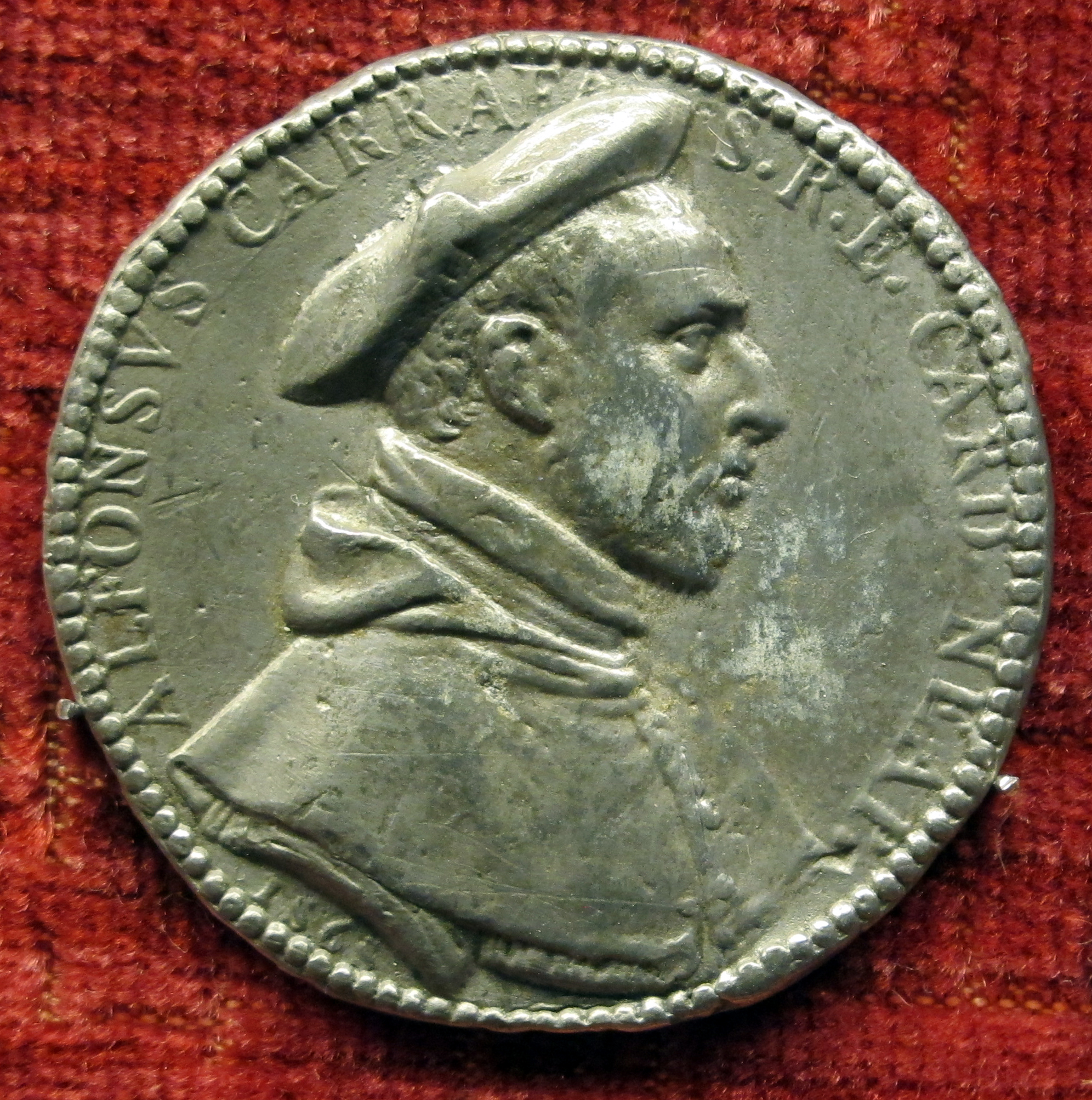 Alfonso Carafa (1540-1565), medaglia di autore anonimo